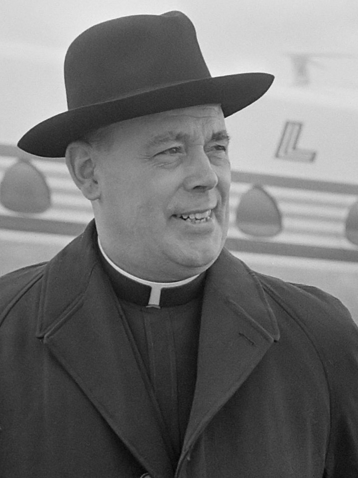 Aankomst Monseigneur Van Lierde op Schiphol (de vicar van Vaticaanstad) 30 juli 1965